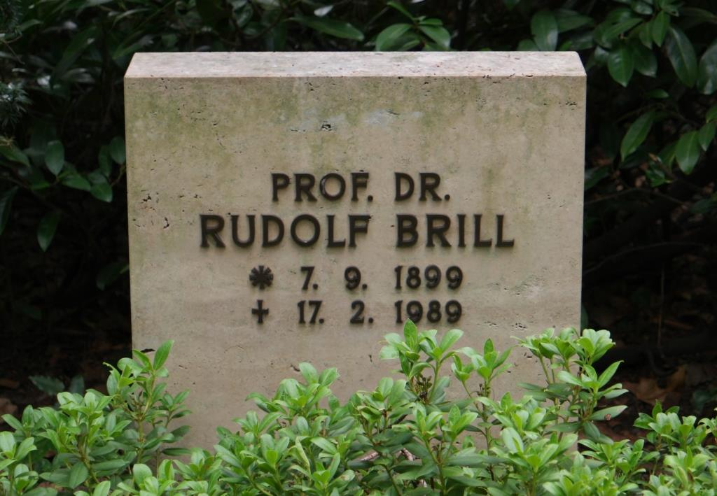 Grab des Chemikers Rudolf Brill (1899-1989) auf dem Waldfriedhof in Darmstadt